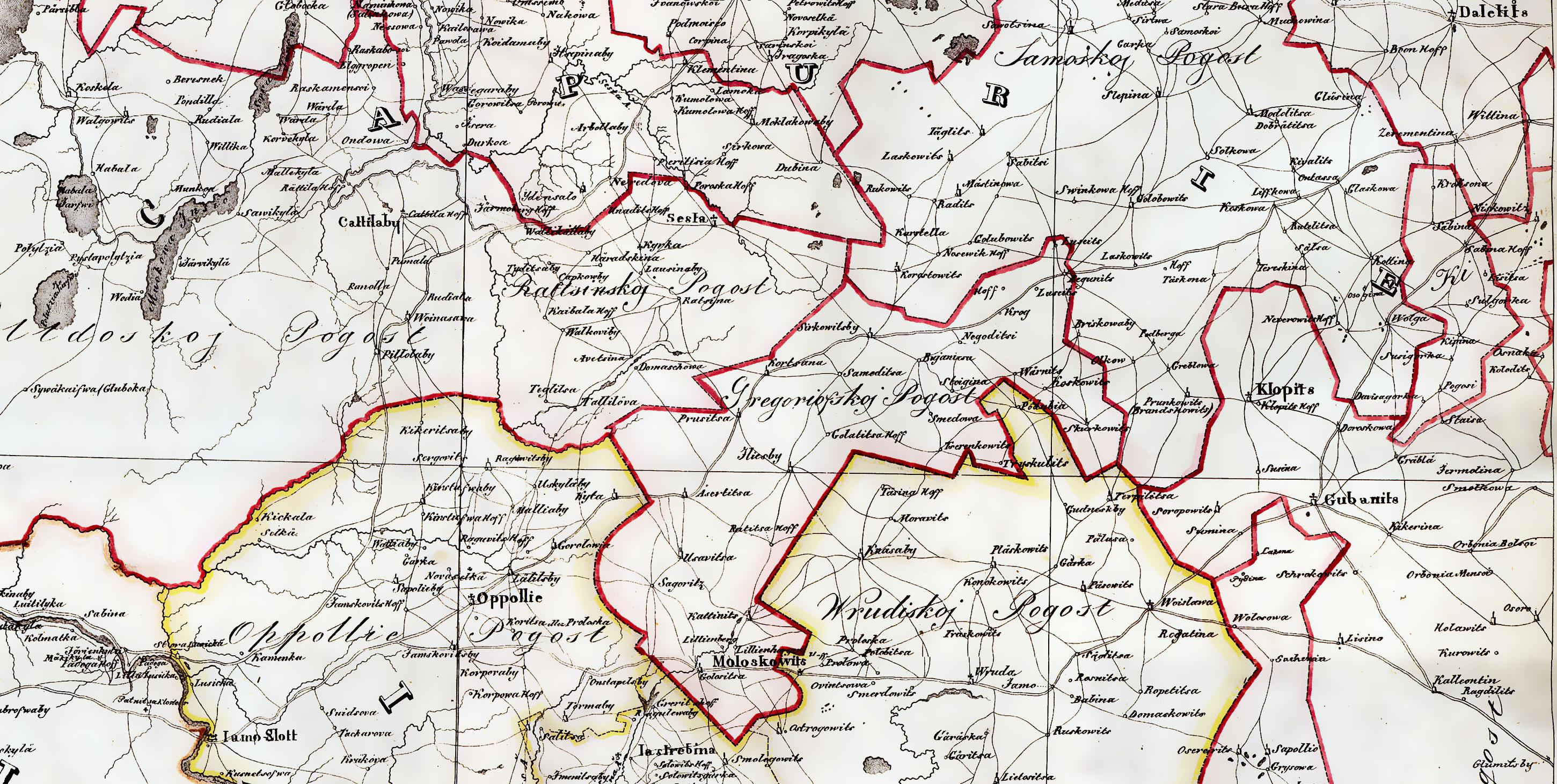 Участок дороги из Ивангорода к устью р. Нева в конце 17 века.